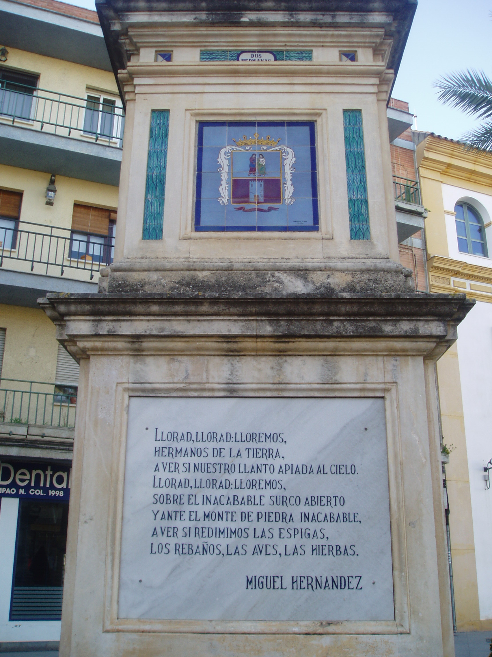 Azulejo del monumento a la fraternidad de Dos Hermanas Sevilla